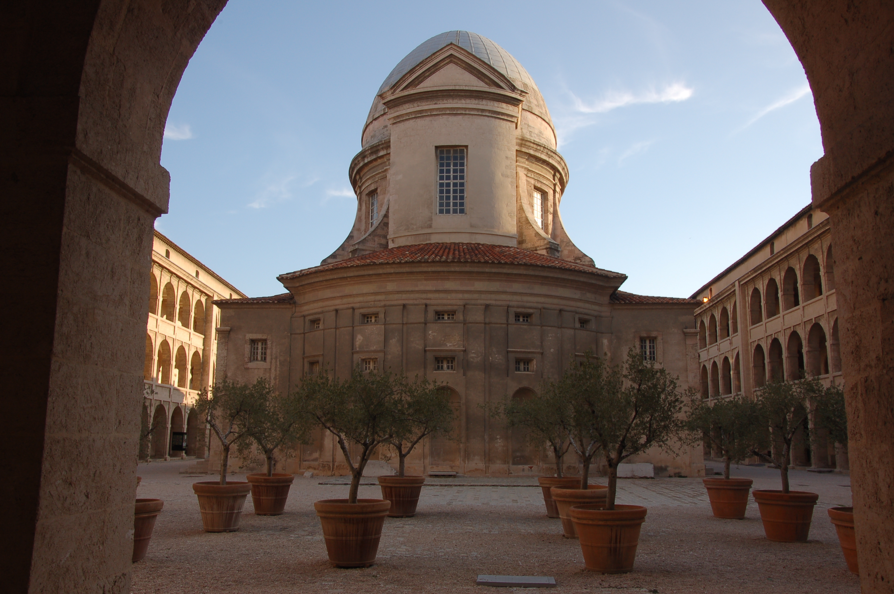 La cour de la Vieille Charité, au beau milieu du Panier, ouvre tranquillité et fraîcheur. Un havre de paix dans le brouhaha de la ville.